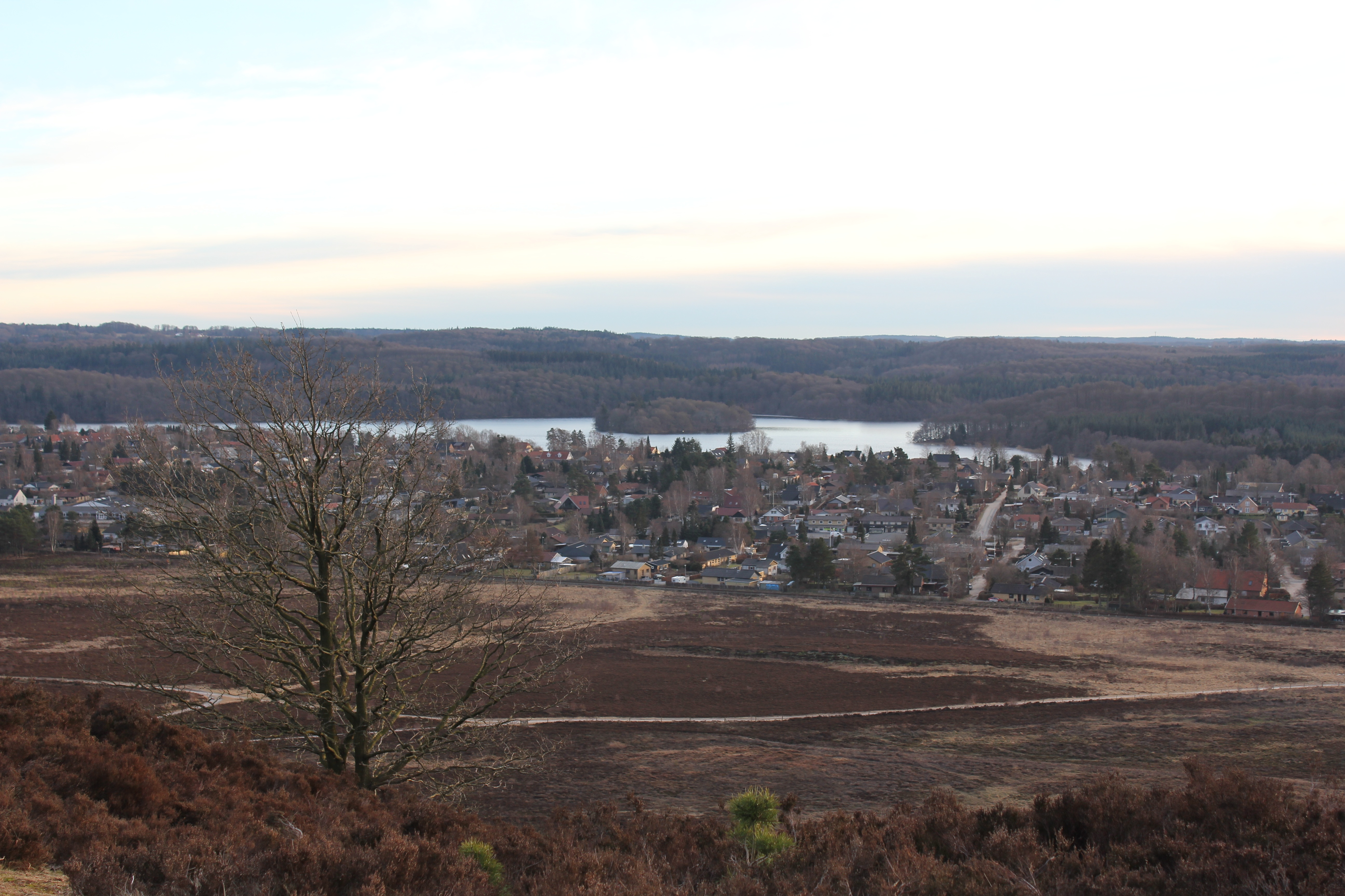 Udsigten mod "Paradiset" fra Sindbjerg. Sejs i forgrunden.